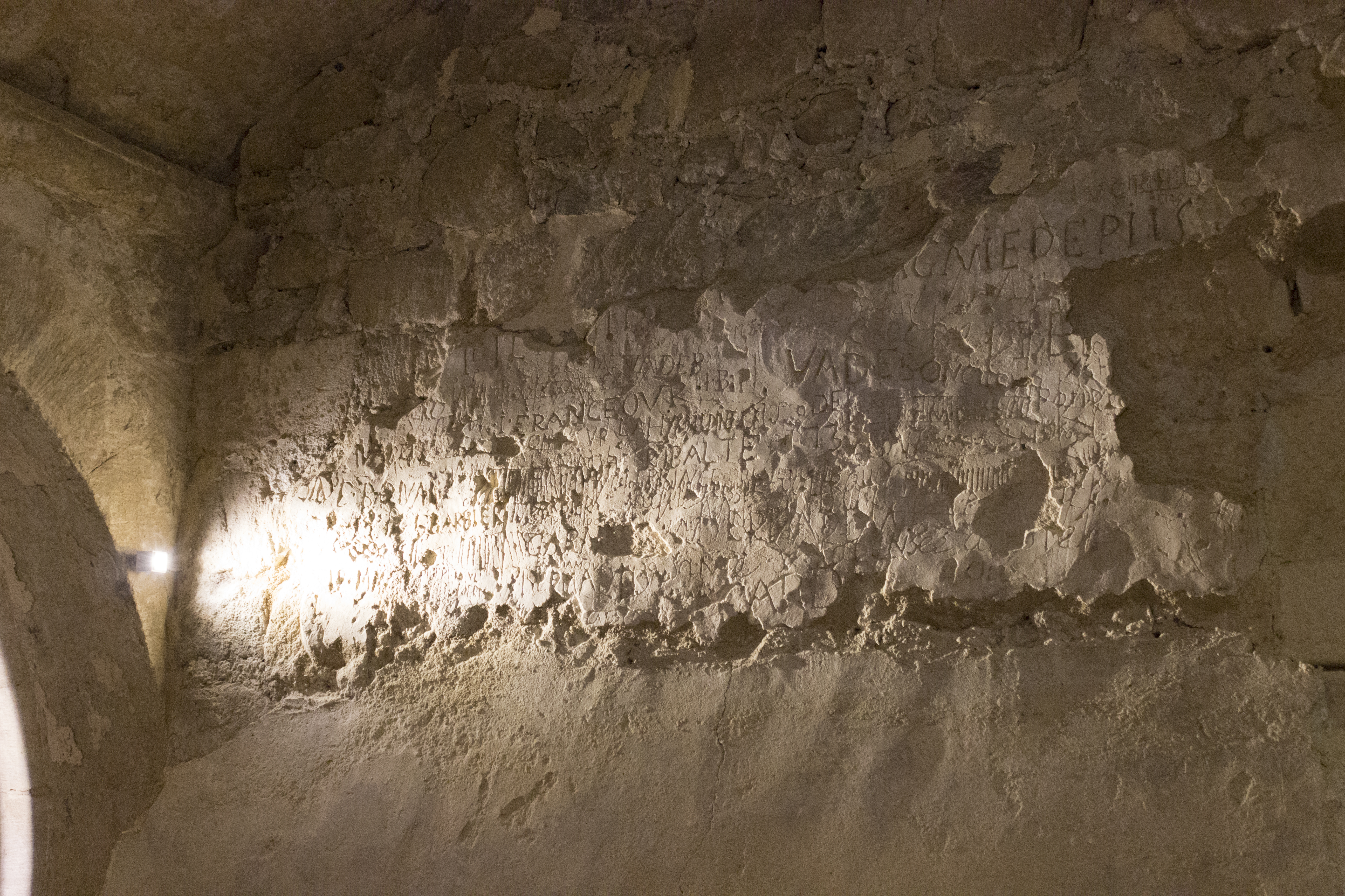 Inscriptions dans la chapelle du château de Sommières.